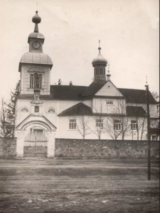 Cerkiew w Trześciance w 1929 roku